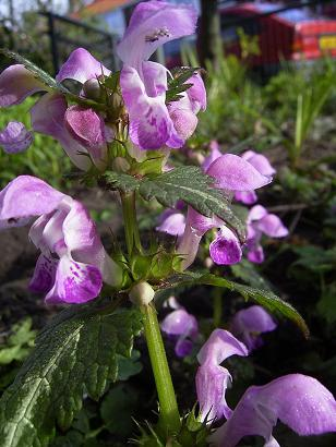 eigen foto, hierbij onder gnu/fdl gebracht